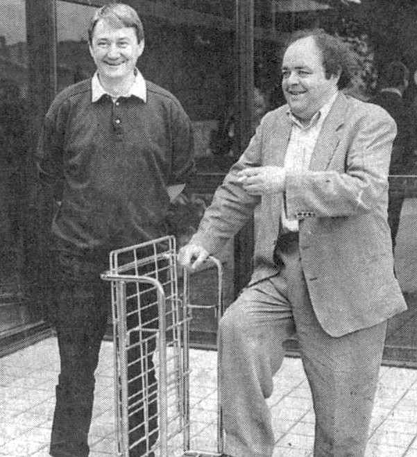 de gauche à droite Alain Meilland et Jacques Villeret pendant la tournée de la pièce de Patrick Suskin " La Contrebasse" en mai 1993